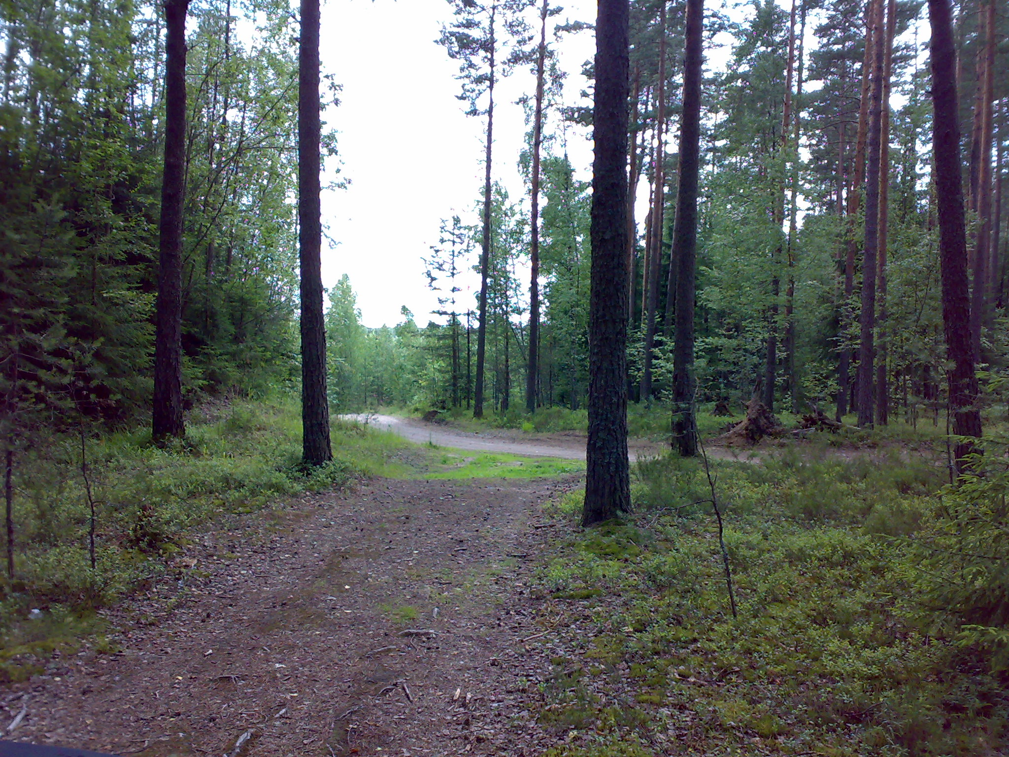 Forest